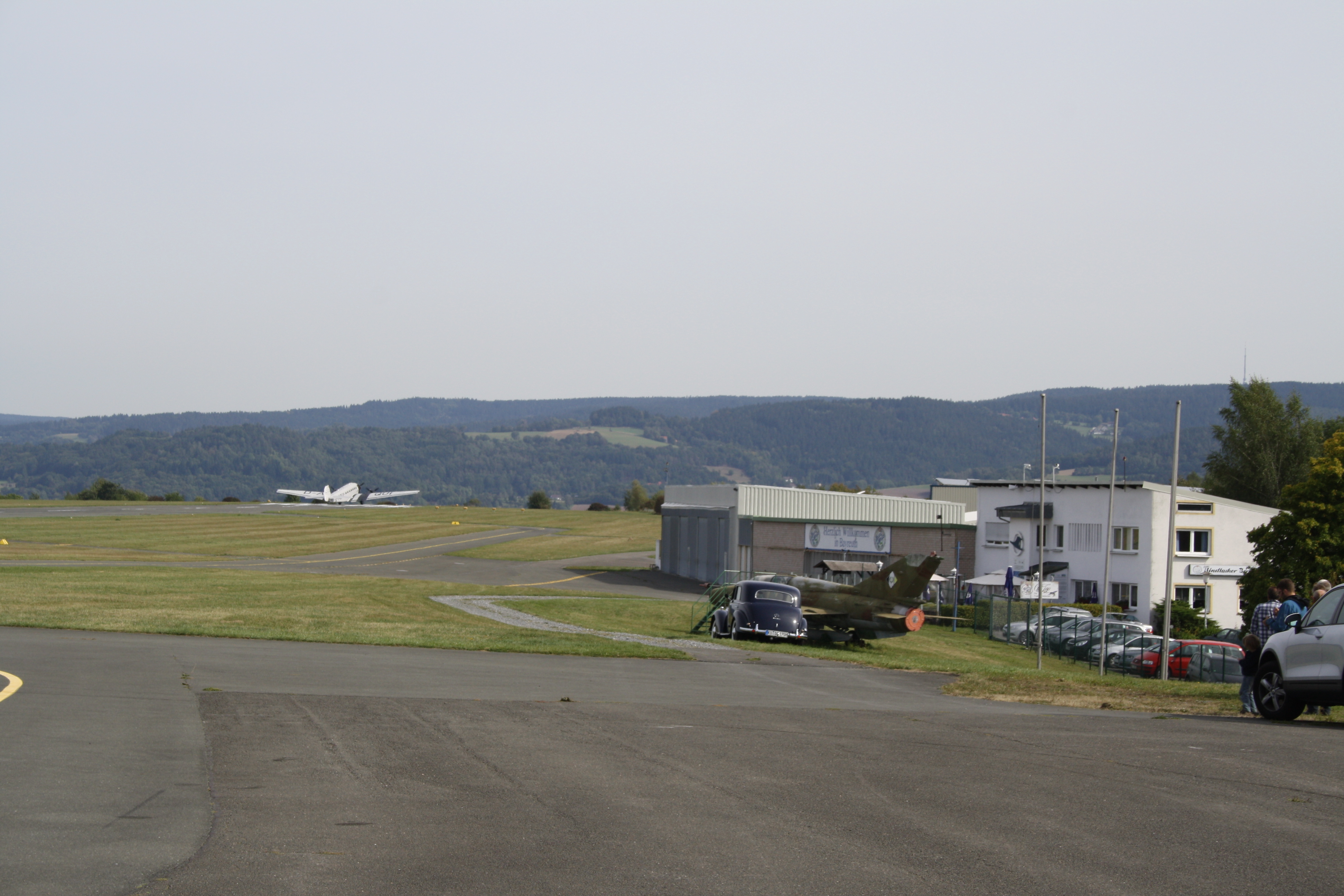 Flugplatz Bayreuth Richtung Norden